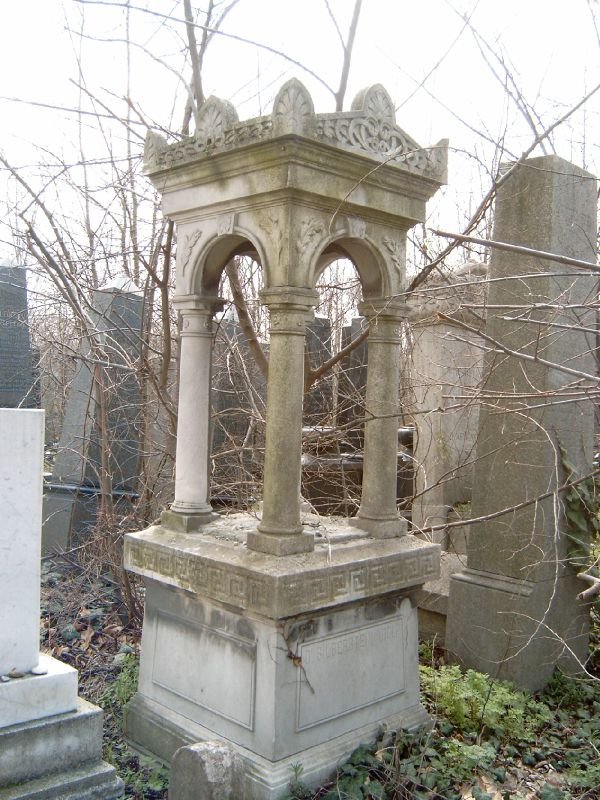 Silberstein Adolf (Ötvös) (Pest, 1845. július 1. – Budapest, 1899. január 12.) újságíró, kritikus sírja Budapesten. Kozma utcai zsidó temető: 2-2-1